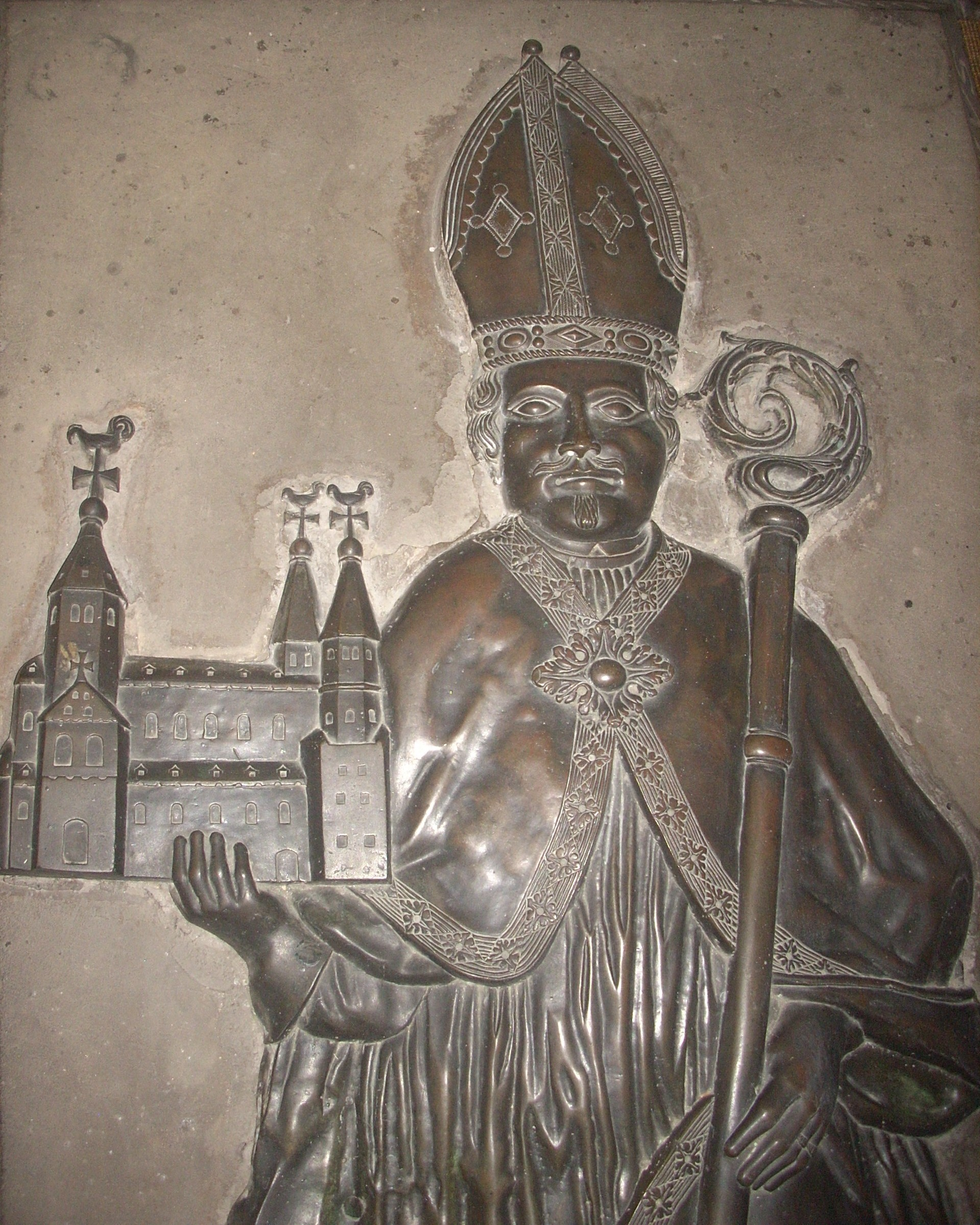 Hildesheim, Basilika St. Godehard, Chor, Grabplatte des Bischofs Bernhard, Stifter von Kirche und Kloster (gest. 1154), Sandstein mit Bronzerelief (1745)